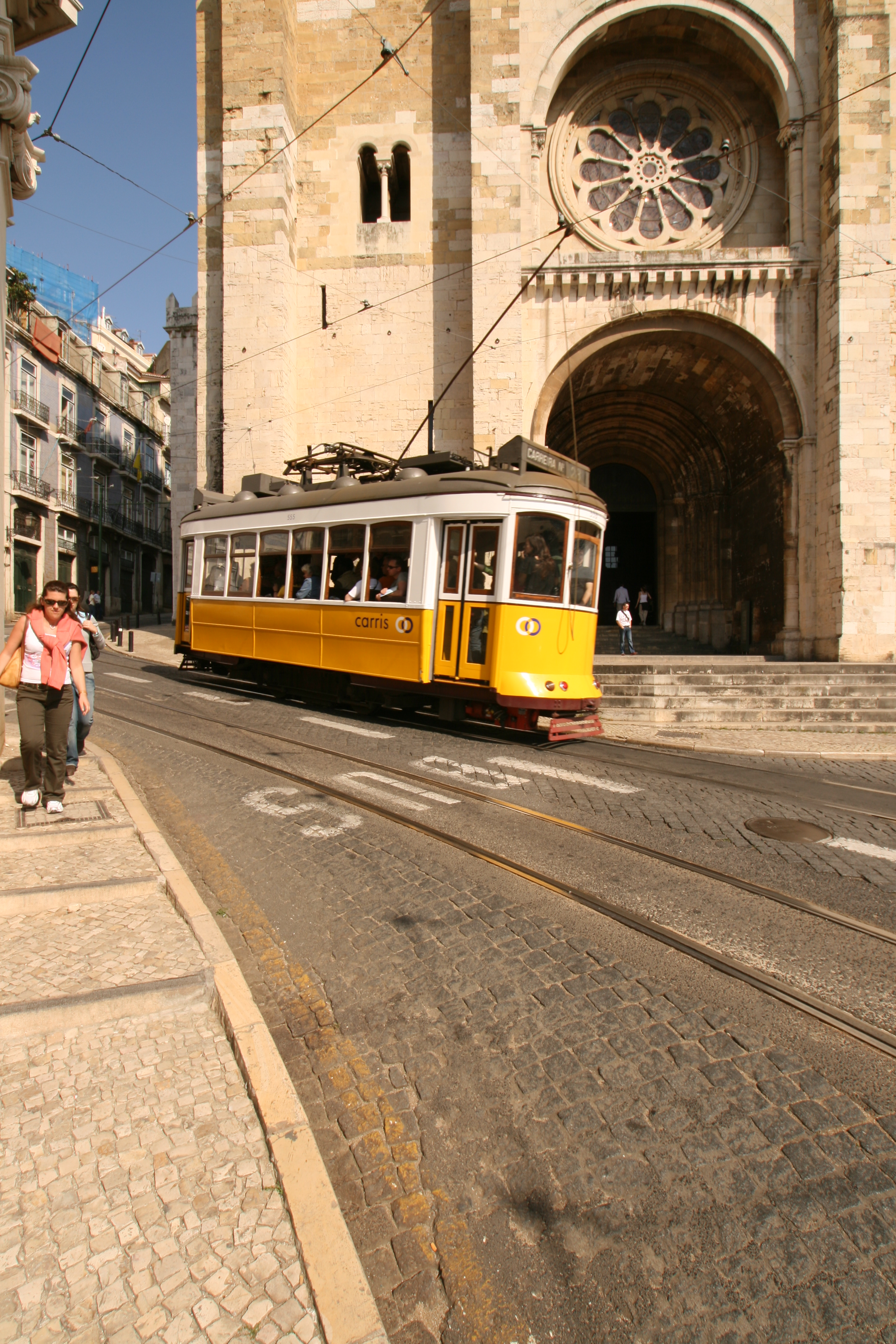 Catedral Sé Patriarcal, Lisbon, Portugal